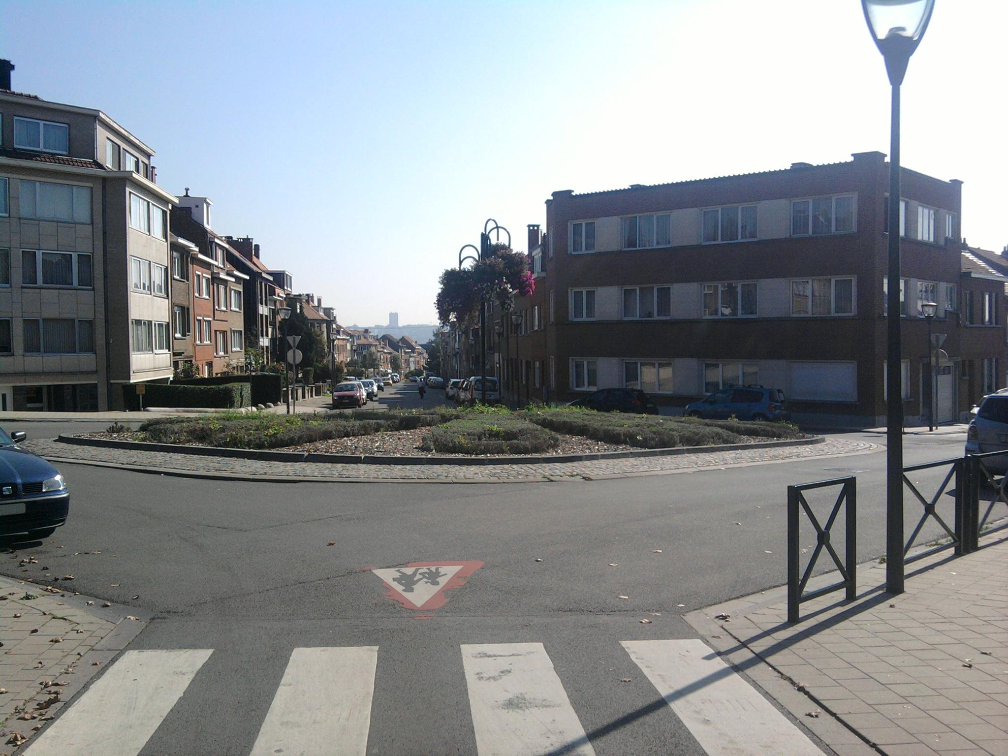 Carrefour (Rue Buffon / Rue Potaerdenberg / Av des Crocus)